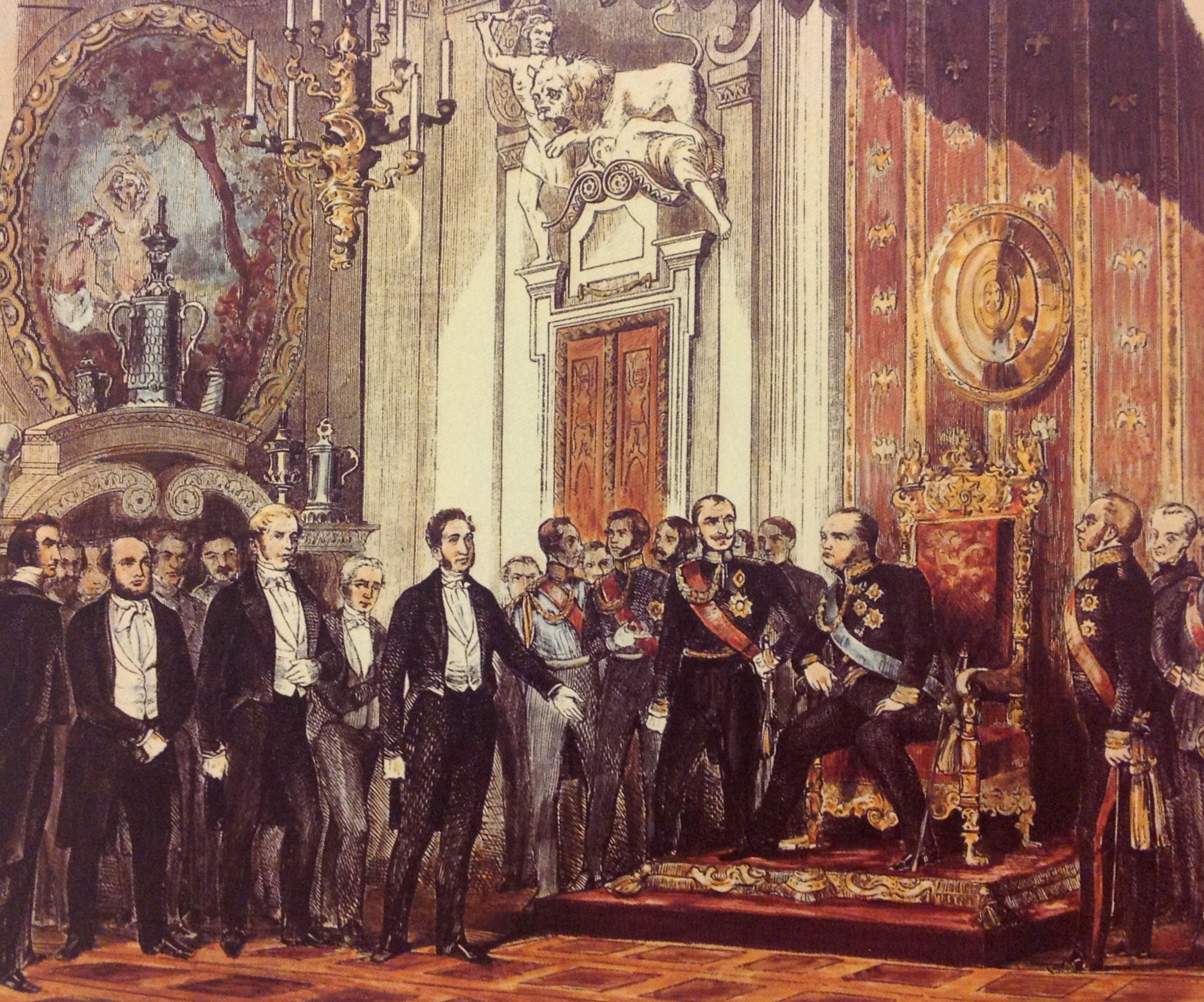 Kaiserdeputation vor dem preußischen König, 3. April 1849.